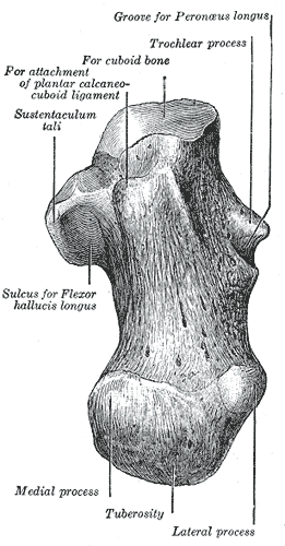 Left calcaneus, inferior surface.